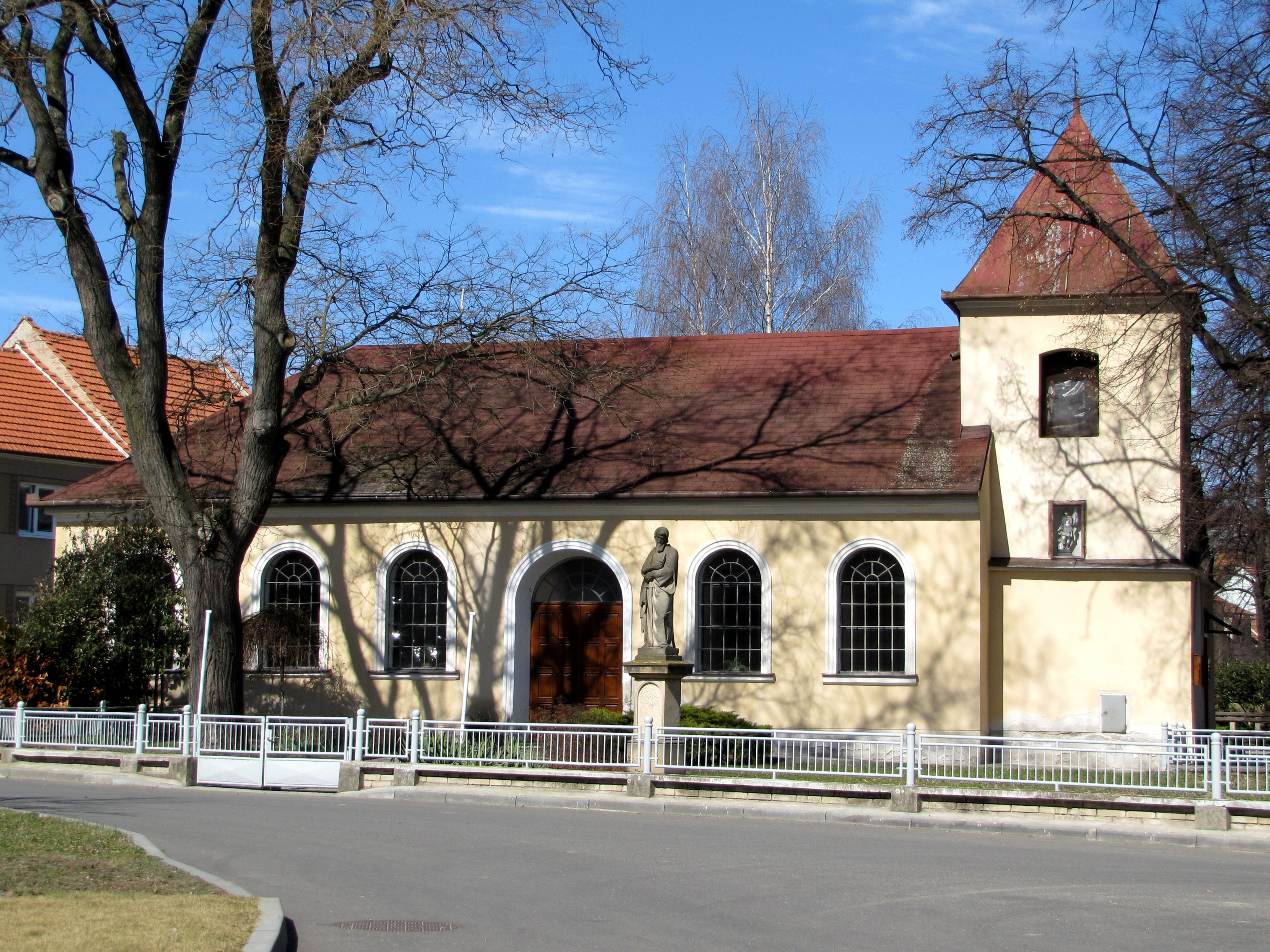 Kaple Nejsvětějšího srdce Panny Marie v Sobůlkách. Vznikla přestavbou starší zvonice a bývalé sýpky v roce 1914.